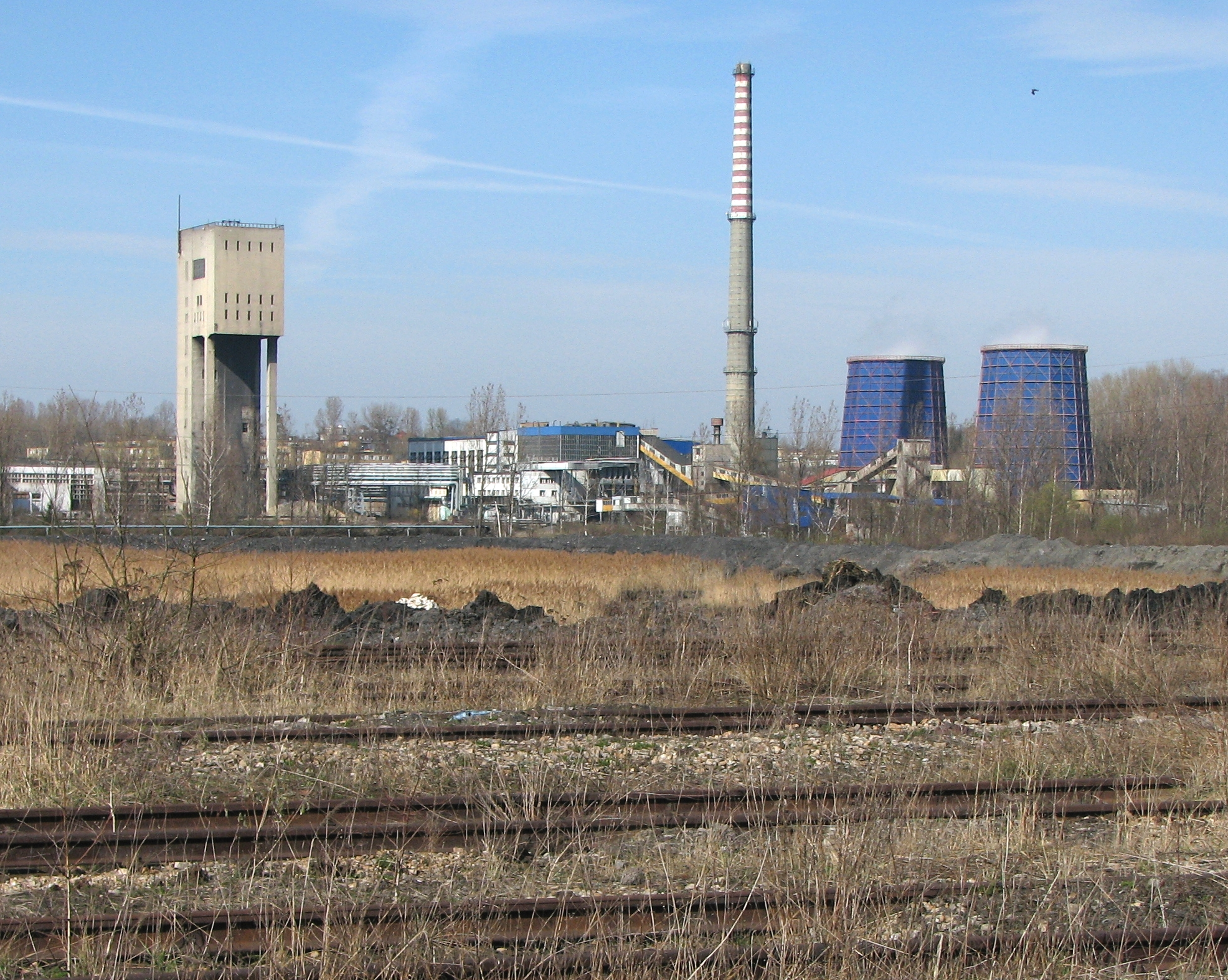 Po lewej widoczny szyb do transportu węgla na powierzchnię - pozostałość po KWK Moszczenica, po prawej elektrociepłownia należąca do Spółki Energetycznej "Jastrzębie".